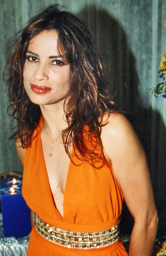 Brazilian actress Isadora Ribeiro.